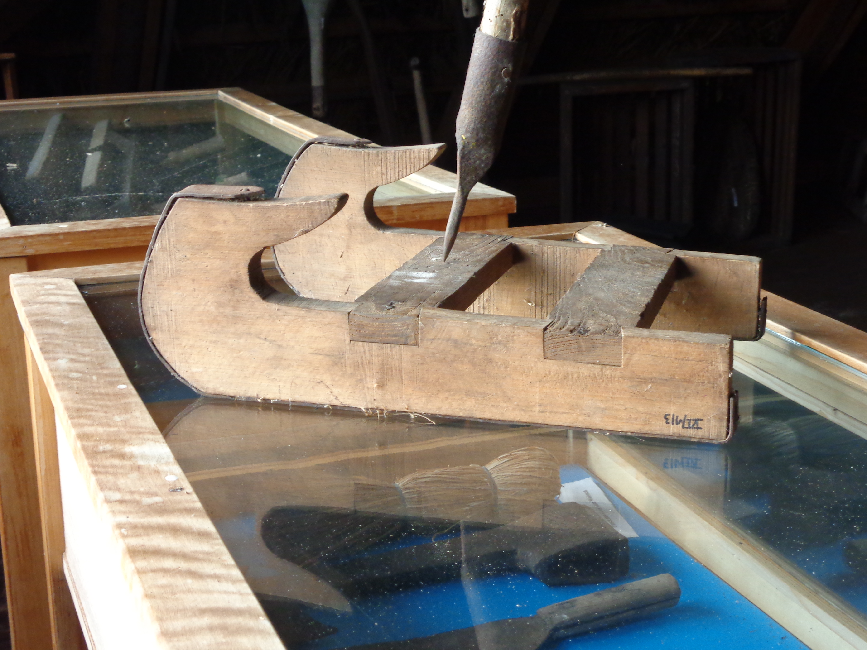 Peikschlitten im Wolhynien-Museum in Linstow.